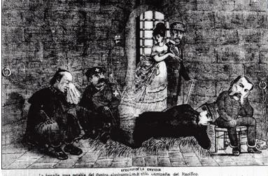 Patricio Ibarra Cifuentes escribió:"Ácida crítica de El Padre Cobos al jefe de la ocupación chilena de Lima almirante Patricio Lynch, debido al procesamiento y sanción al comandante Ambrosio Letelier y algunos de sus subordinados, debido a las irregularidades cometidas en su expedición a la Sierra en abril de 1881. El grabado muestra encarcelados, engrillados y con un centinela a la vista al mencionado Letelier, al teniente coronel Hilario Bouquet y a dos personajes denominados como “El Esculapio” y “El Capellán”, de los cuales se desconoce el porque están incluidos en la caricatura. Bouquet, francés de nacimiento se caracterizó por su crueldad y sus prácticas reñidas con la moral, también fue condenado junto a Letelier y otro oficial de apellidos Romero Roa. El caricaturista atribuye los castigos dados a estos militares a la envidia de Lynch, quien observa atentamente la escena del brazo de una mujer de la alta sociedad peruana. El Almirante era acusado de gozar de fama y popularidad entre las damas limeñas, debido a su caballerosidad y triunfos obtenidos en los campos de batalla. La leyenda del dibujo asevera que esta es “la hazaña más notable del contra-almirante Lynch en la campaña del Pacífico”. El boceto salió a las calles el 1º de septiembre de 1881."